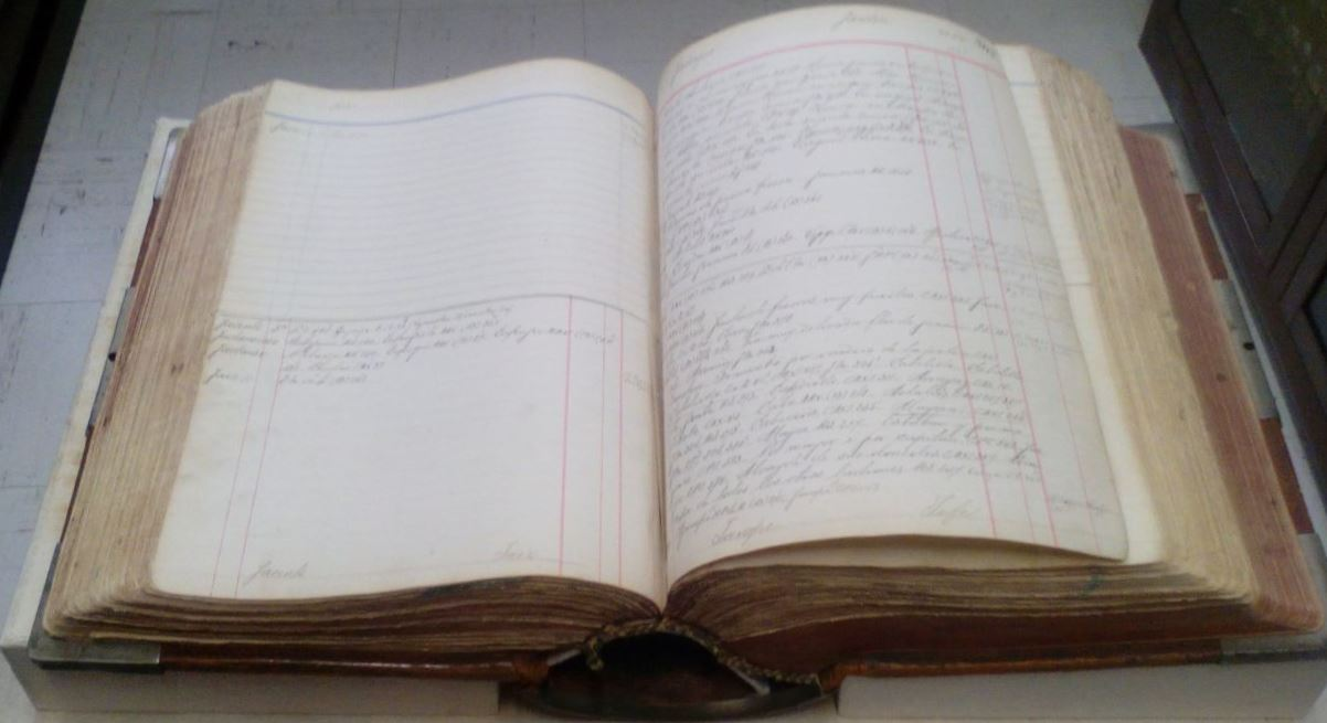 Libro de contabilidad de Rufino José Cuervo donado a la Biblioteca Nacional de Colombia. Allí consignaba las entradas para su diccionario de construcción y régimen de la lengua castellana.